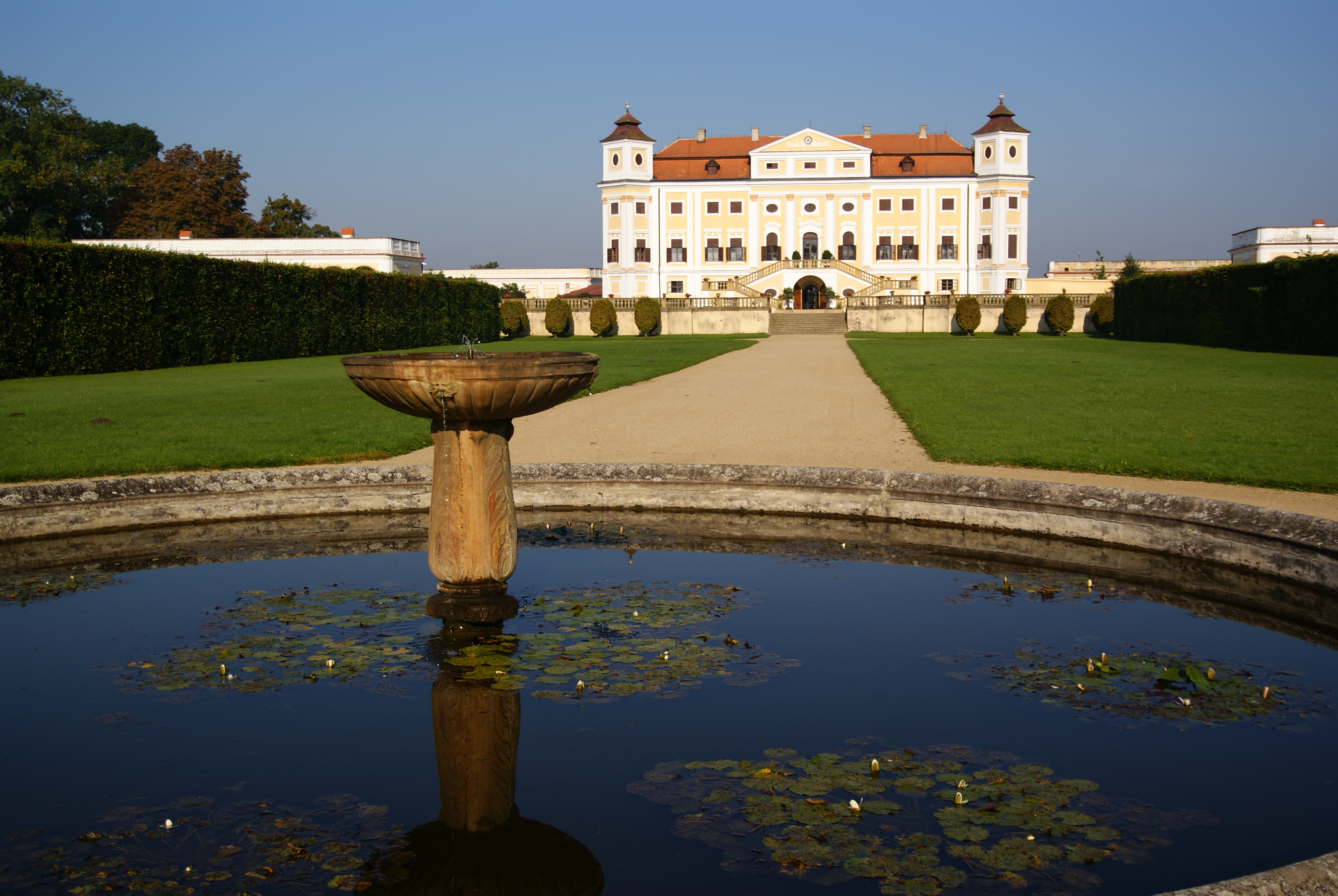 Zámek Milotice, Milotice 1